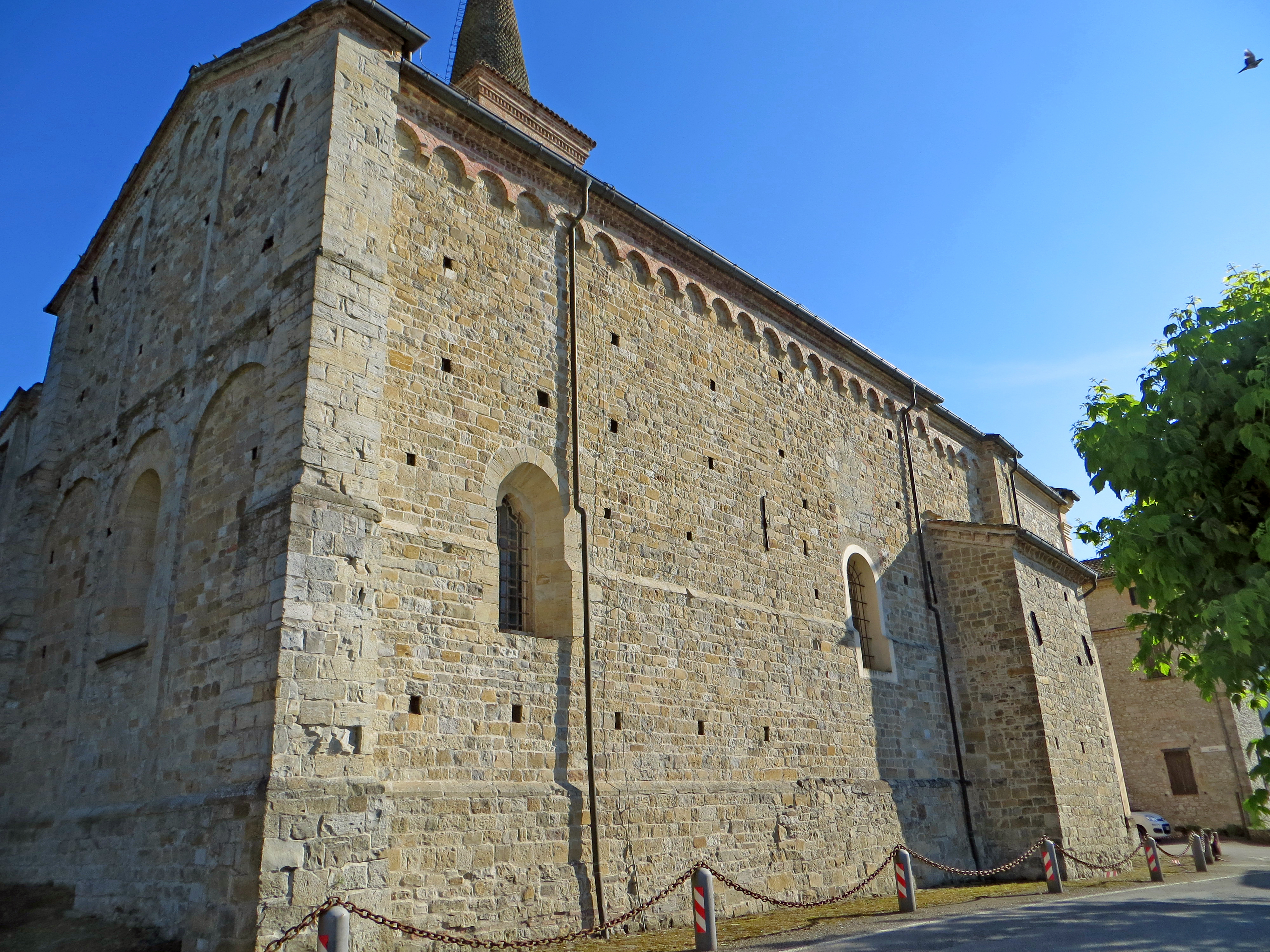 Chiesa di Sant'Ilario (Sant'Ilario Baganza, Felino) - abside e lato nord